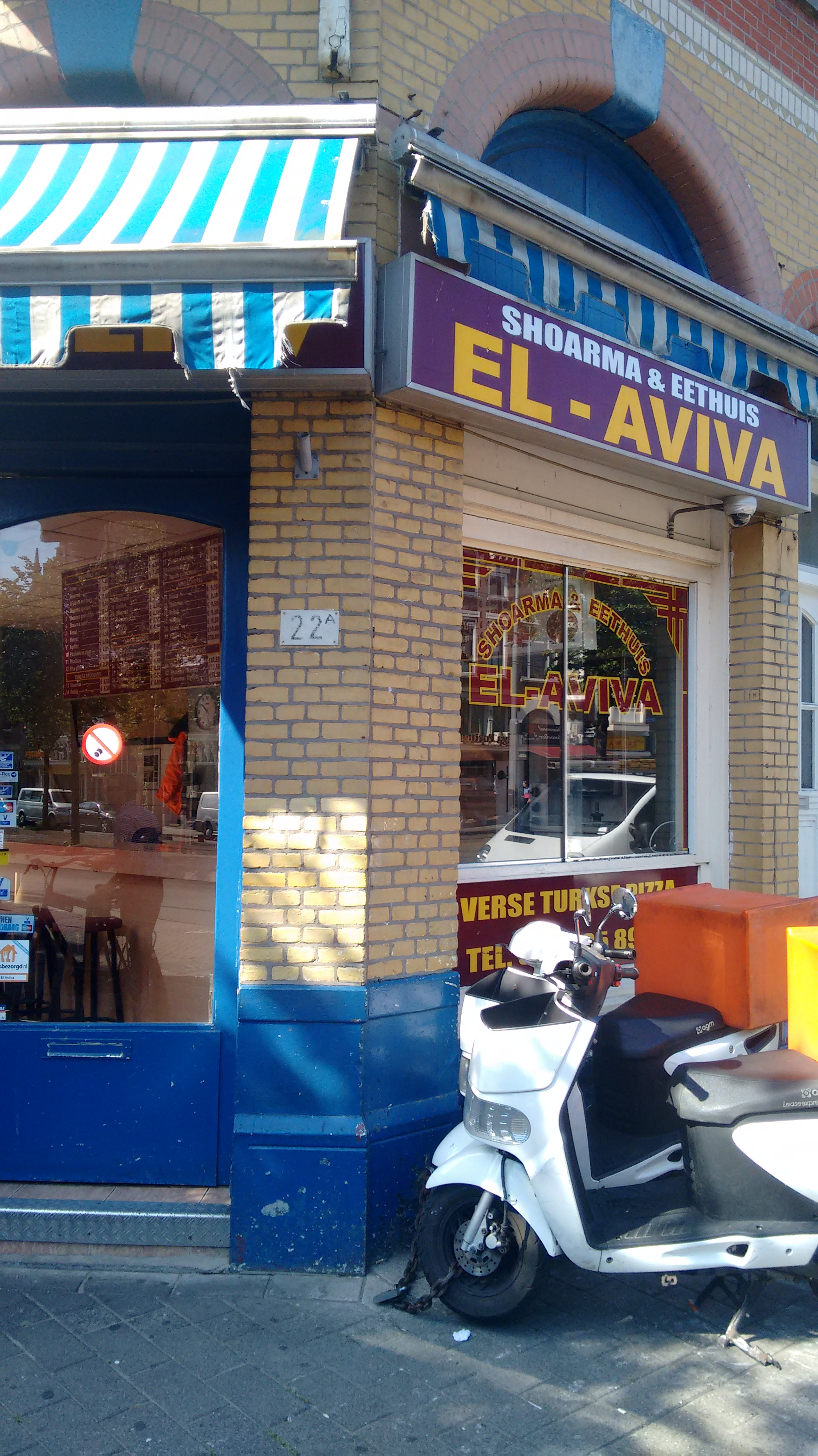 Shoarmazaak El-Aviva op de Schiedamseweg, Rotterdam-Delfshaven. De plek waar de kapsalon is ontstaan en uitgevonden.